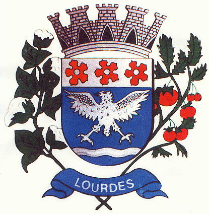 Bandeira do município de Lourdes - SP - Brasil.